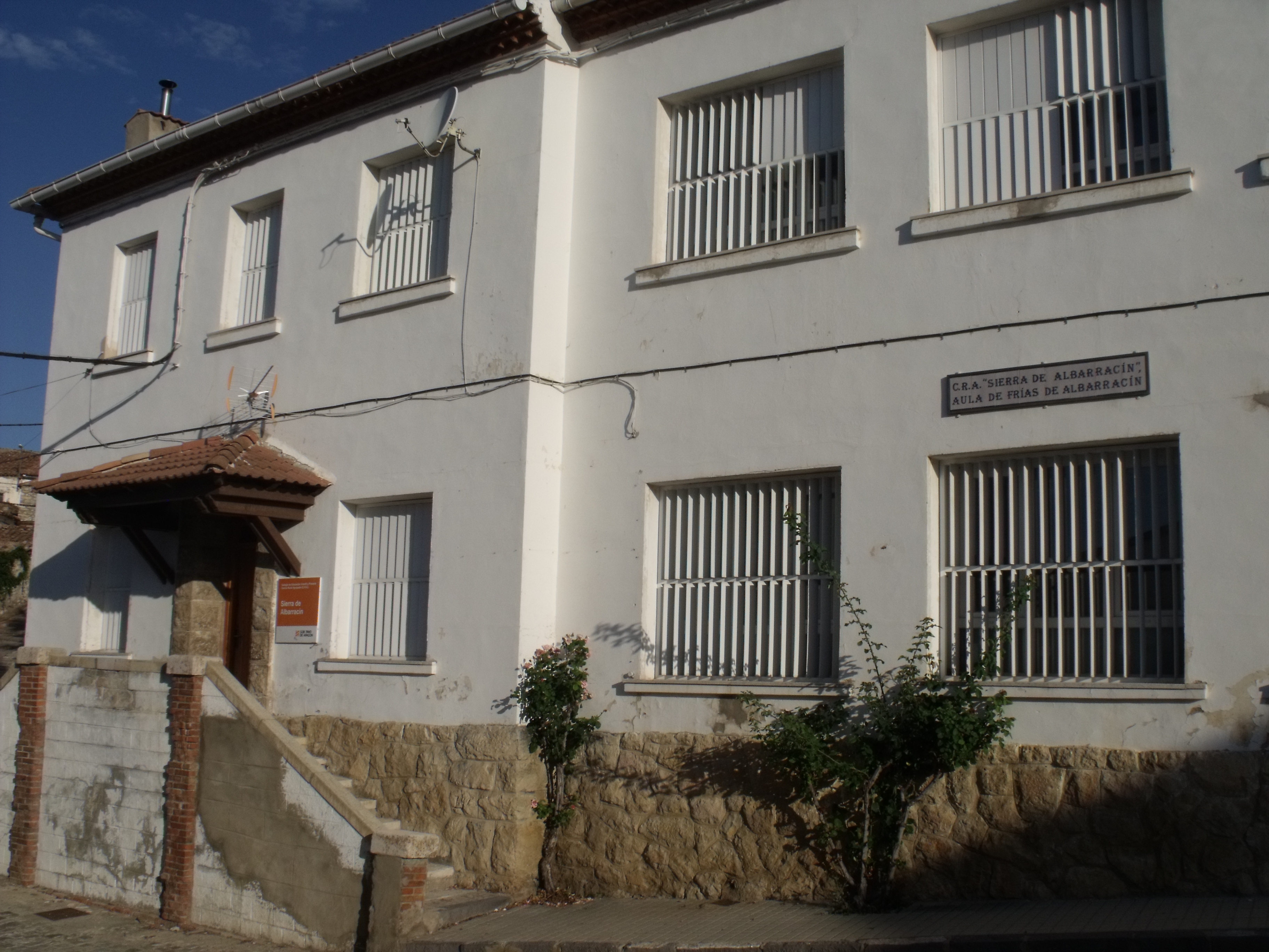 Aula en Frías de Albarracín del Centro Rural Agrupado Sierra de Albarracín. Aragonés: Fridas d'Albarrazín